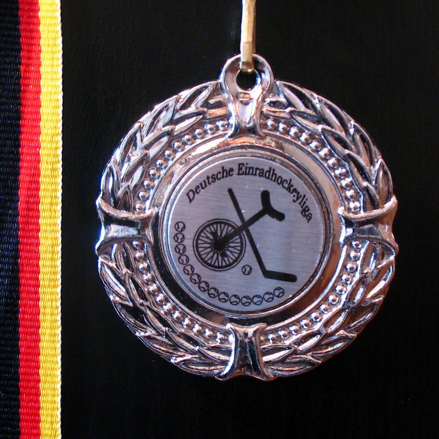 Silbermedaille mit Logo der Deutschen Einradhockeylige